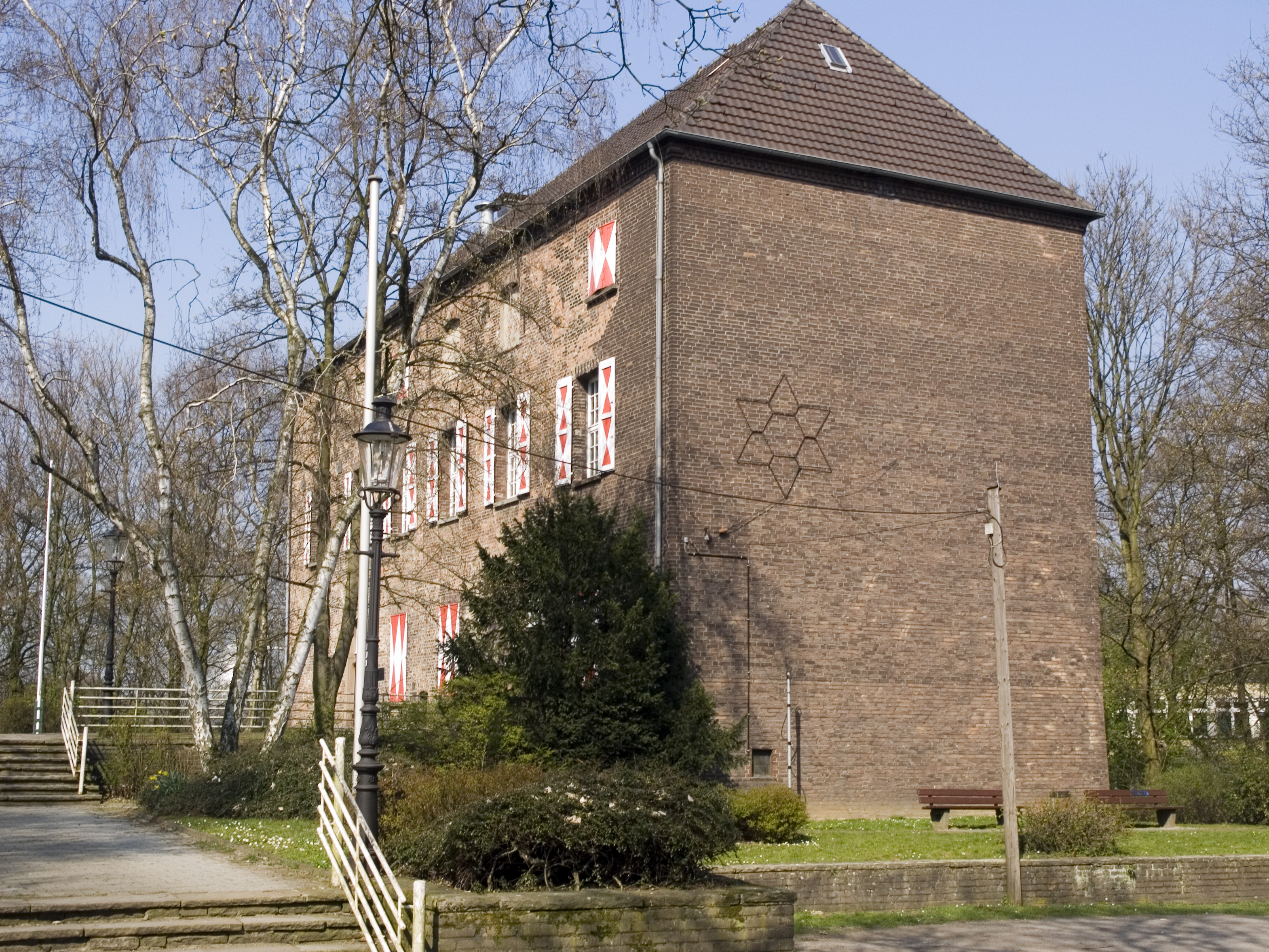 Северный Рейн - Весфалия, Оберхаузен - замок Холтен